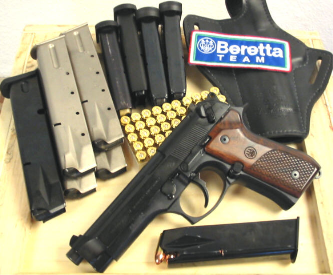 Beretta 92 FS, Ersatzmagazine, Holster und Patronen